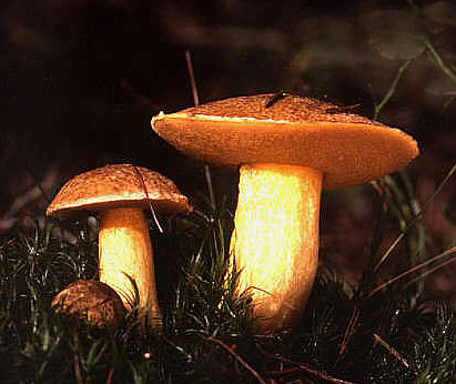 Sandröhrling (Suillus variegatus)